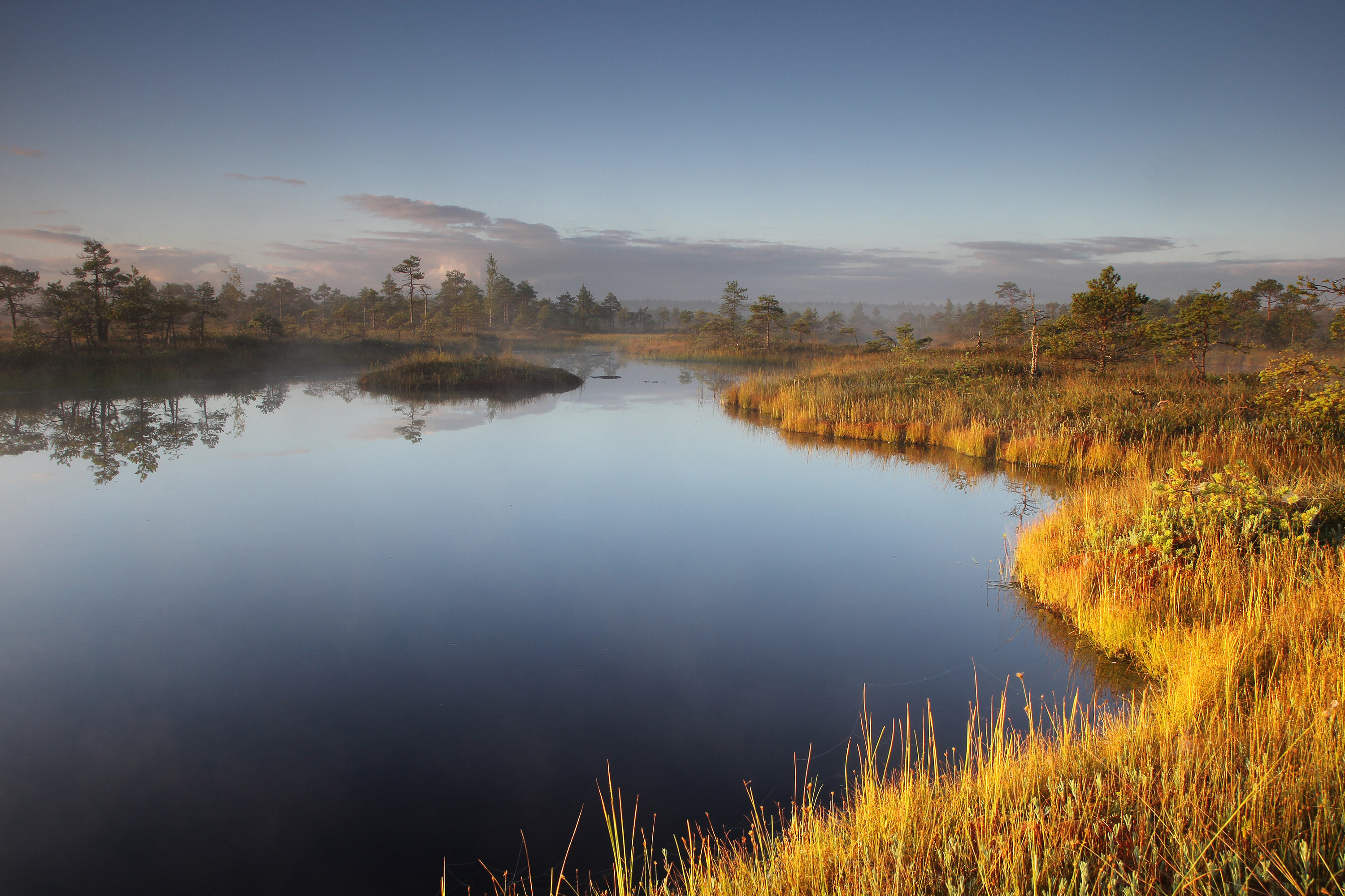 "Hommik". Rahu ja vaikus. Hetk ning kõik ärkab. Endla LK.